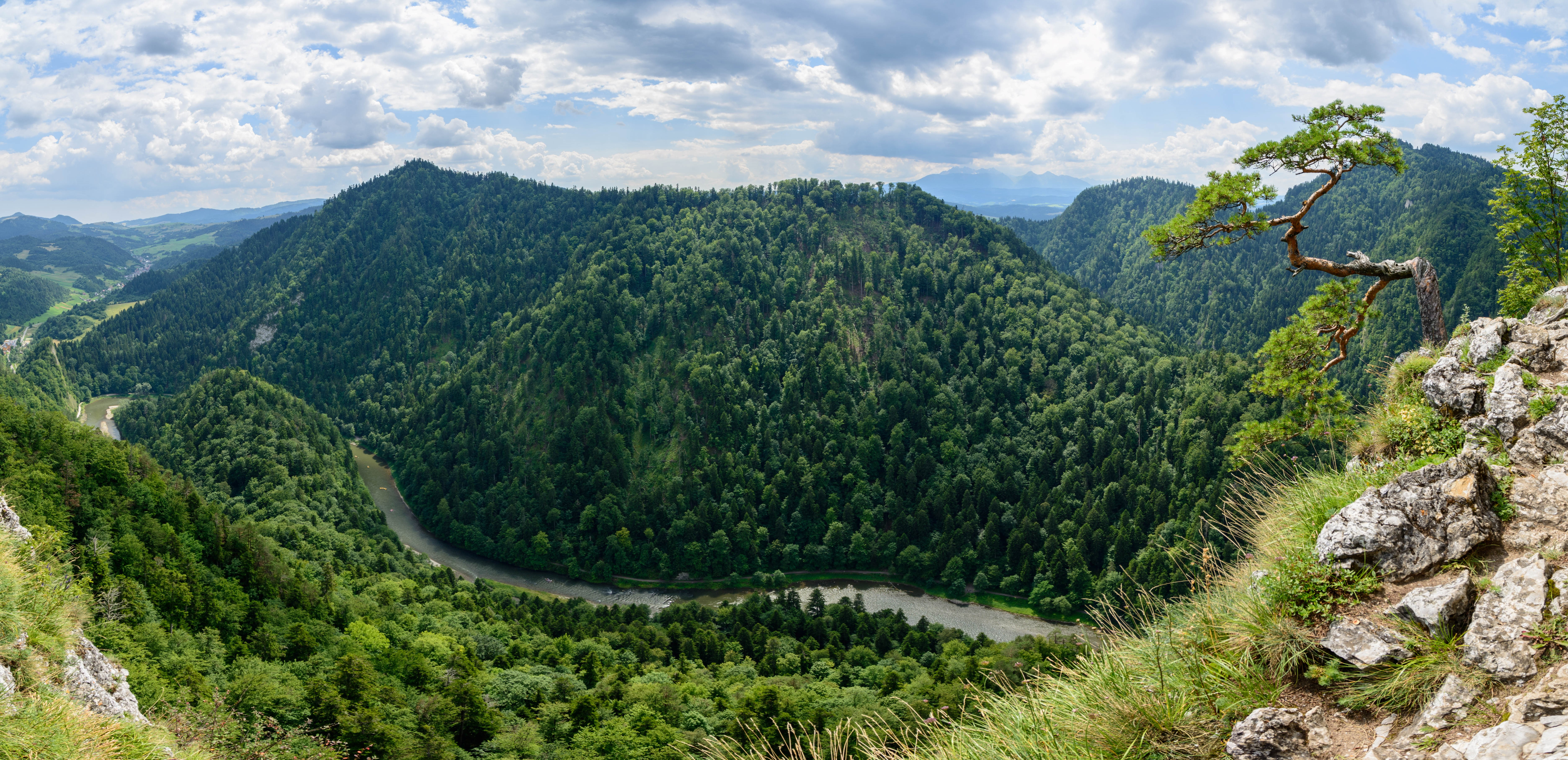 Park narodowy: Pieniński Park Narodowy This is a photography of protected area with CRFOP ID PL.ZIPOP.1393.PN.5